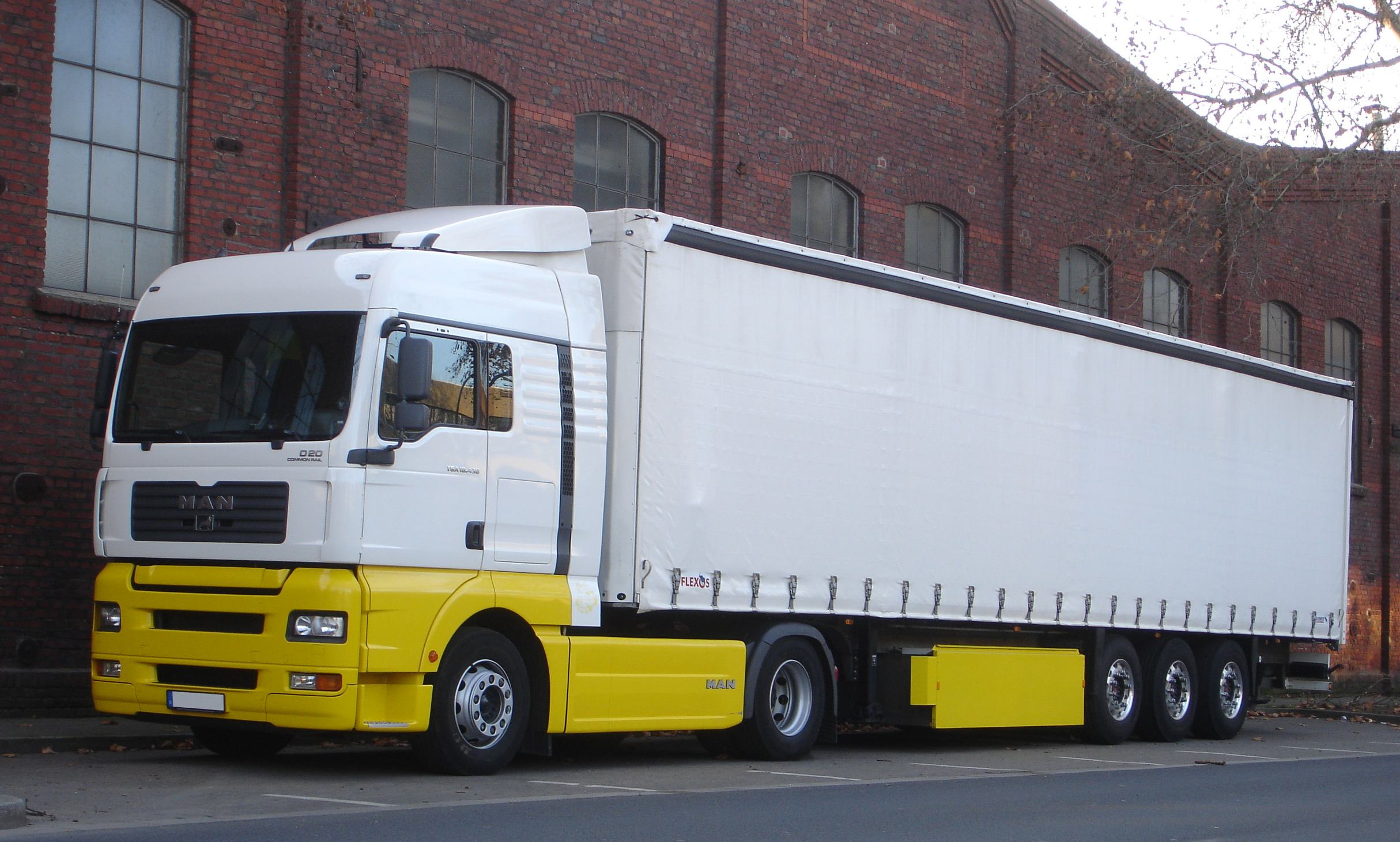 MAN TGA 18-430 XXL Gardinenplanensattelzug